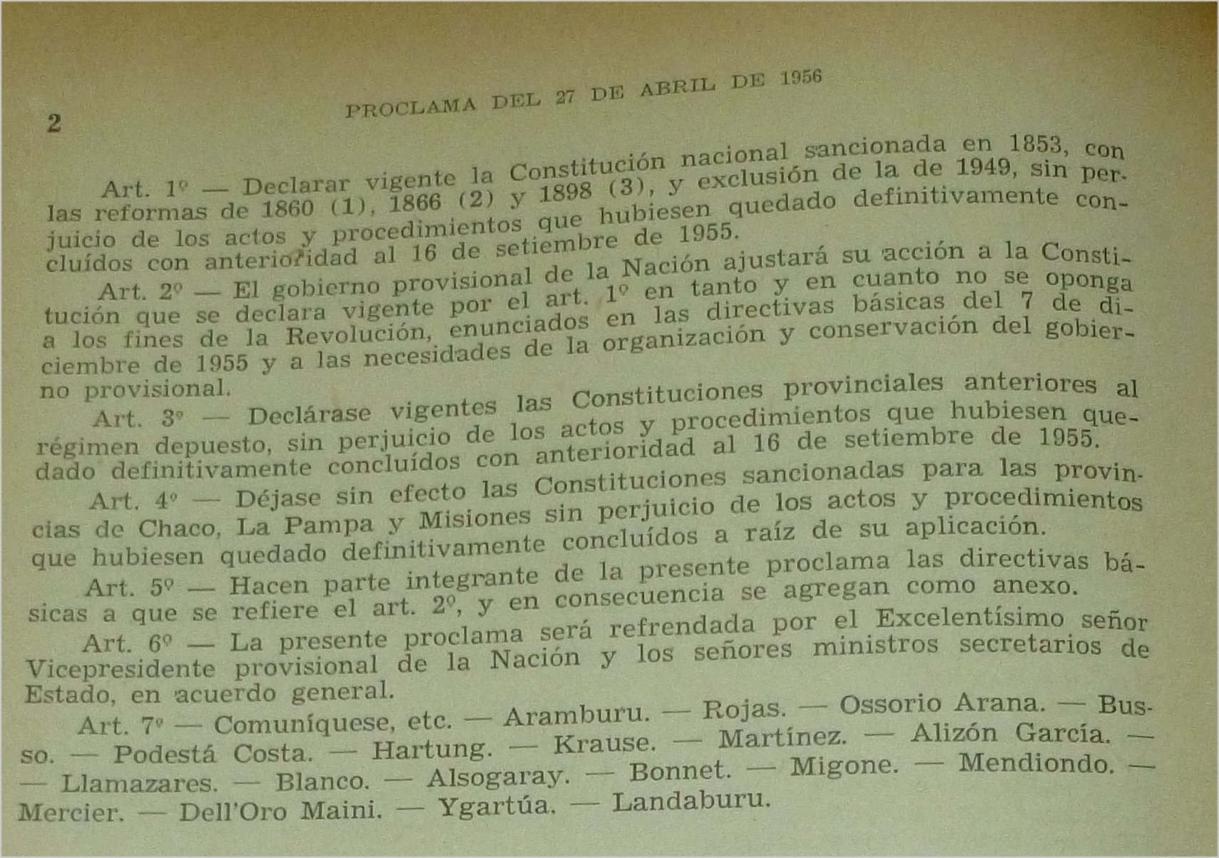 Proclama del 27 de abril de 1956 (2 de 2). Excluye la Constitución nacional y declara vigente el texto constitucional de 1853/60/93